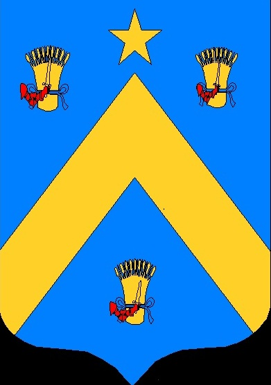 Félix-Etienne Dehau - armoiries